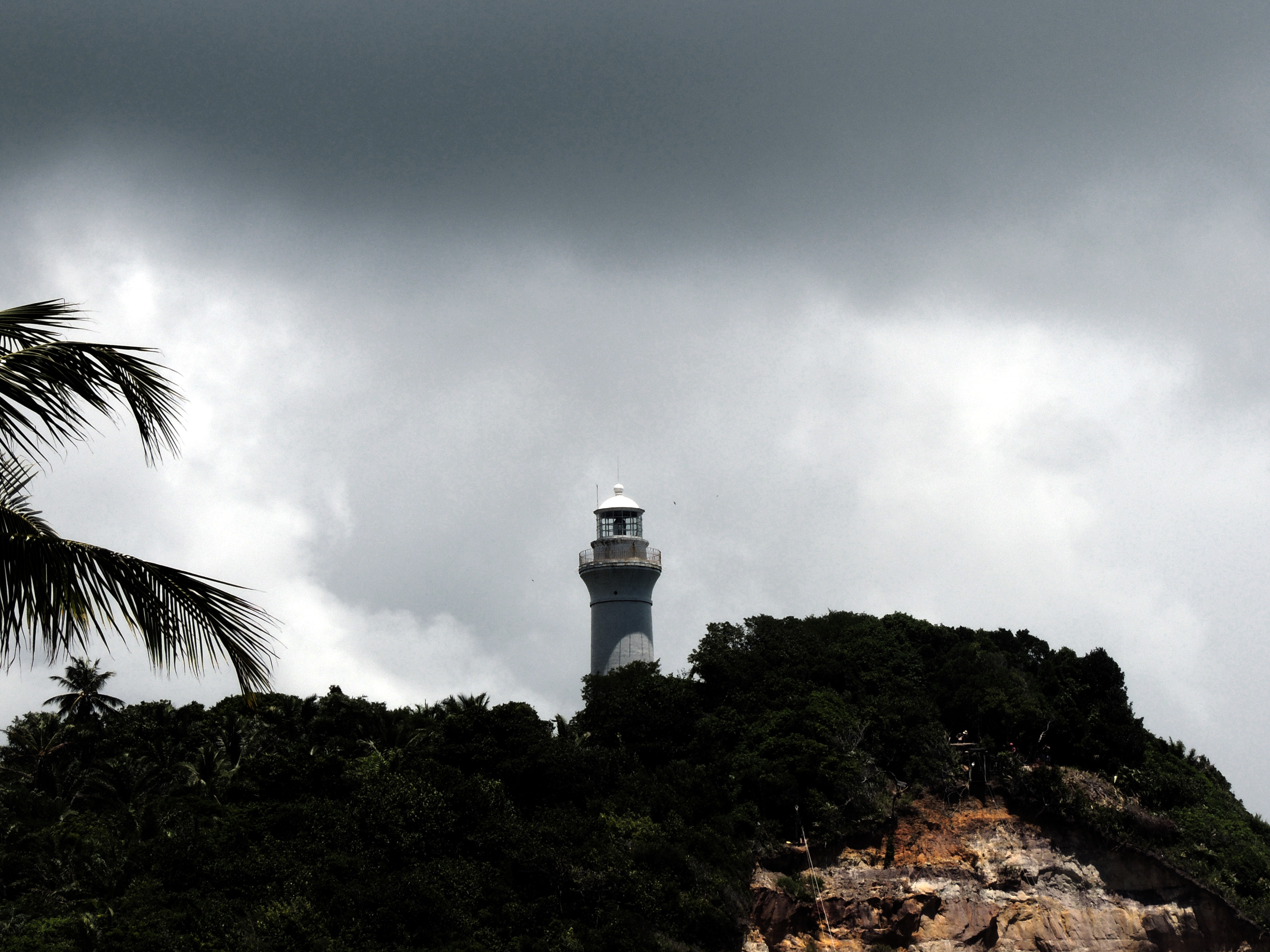 Faro del Morro de San Pablo, Salvador de Bahía, Brasil